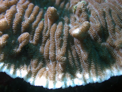 Merulina ampliata, margen de colonia mostrando crecimiento